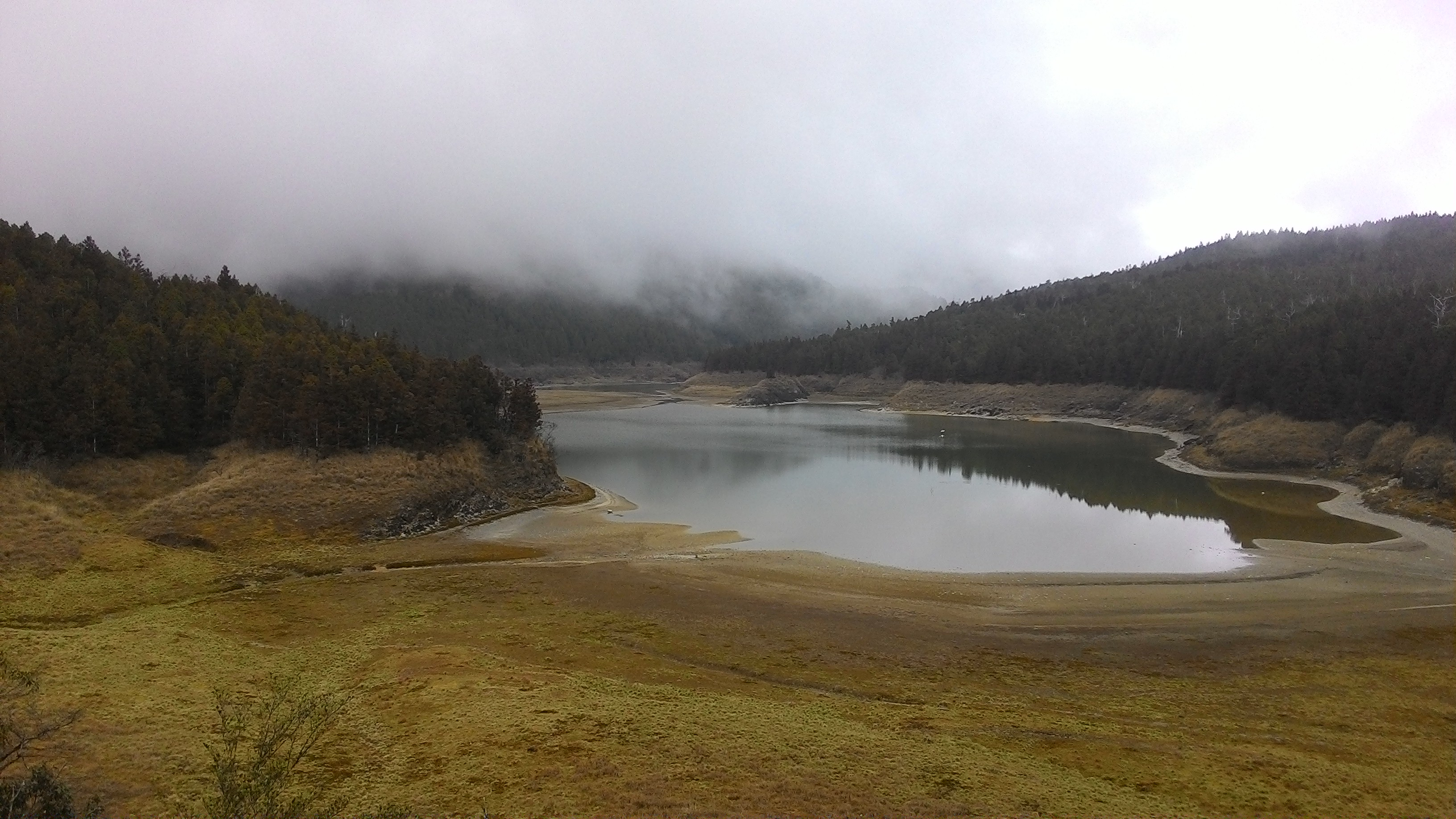 2015年2月22日的翠峰湖